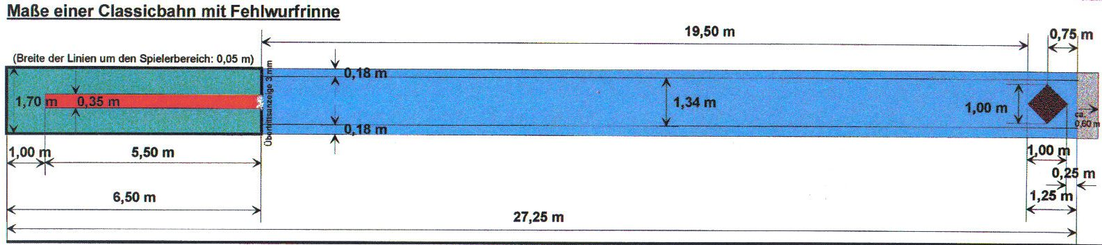 Maße einer Classicbahn mit Fehlwurfrinne